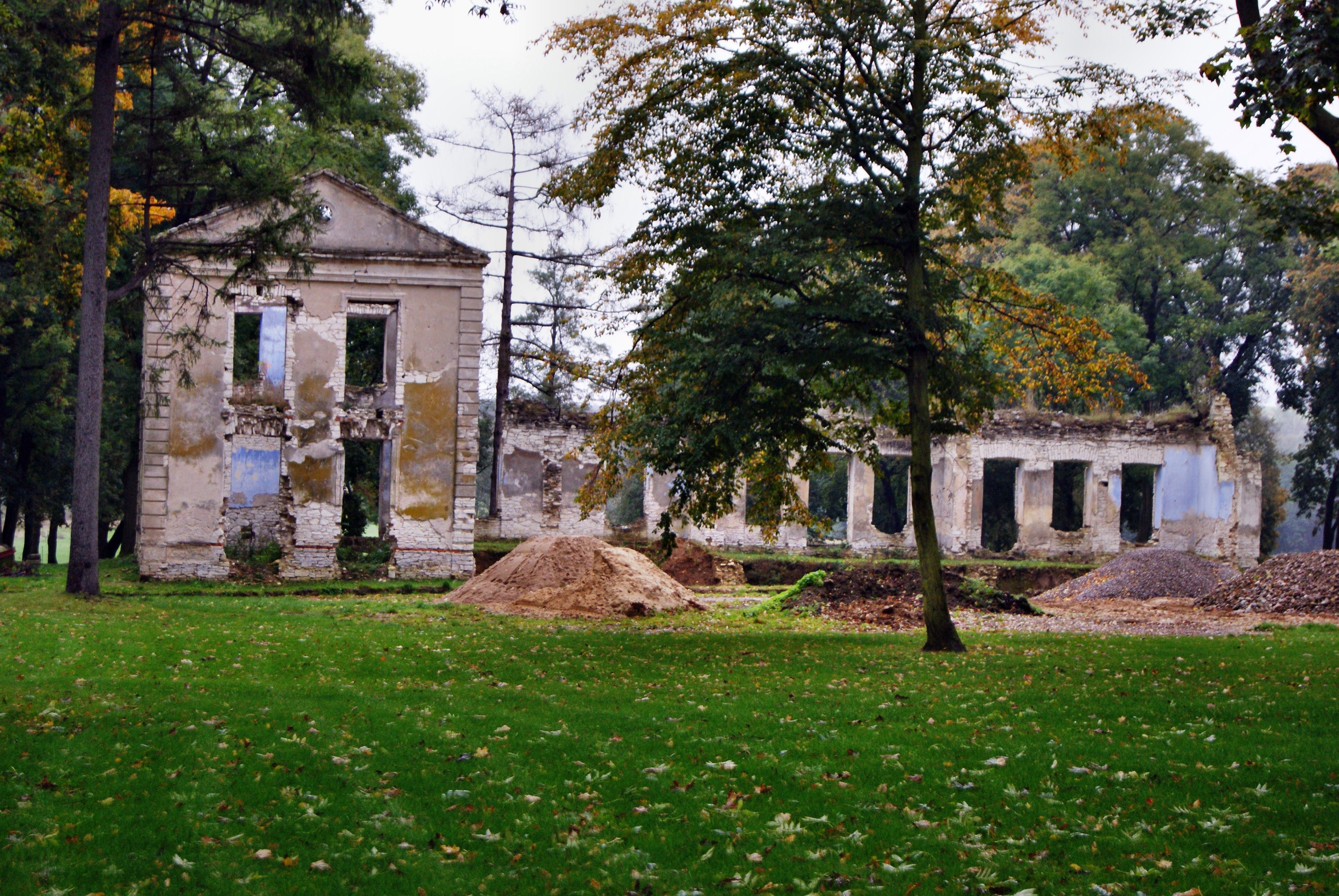 zespół pałacowy: - ruiny pałacu Gardzienice